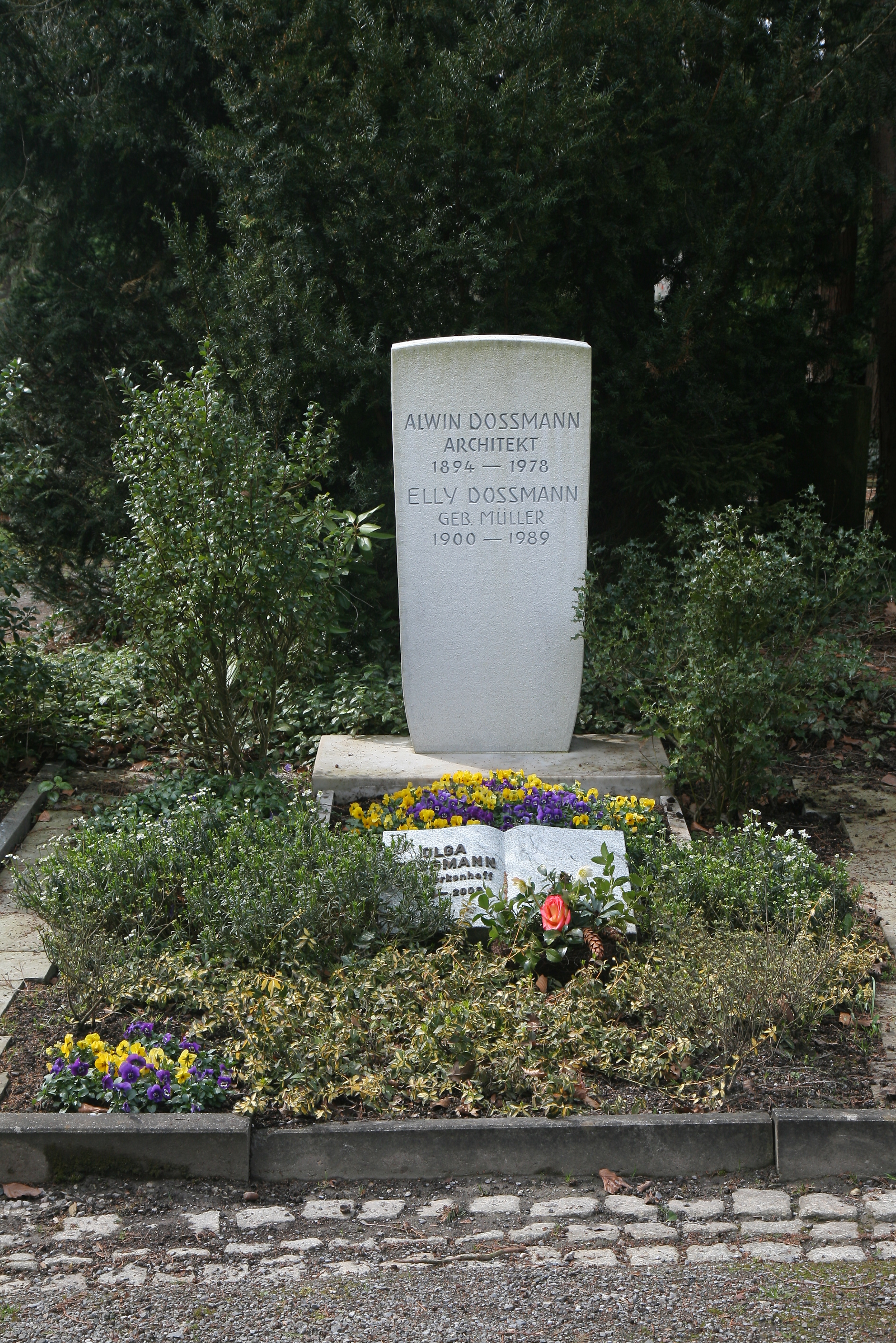 Hauptfriedhof in Iserlohn, Oestricher Straße. Grab Alwin Dossmann (1894-1978), Architekt.